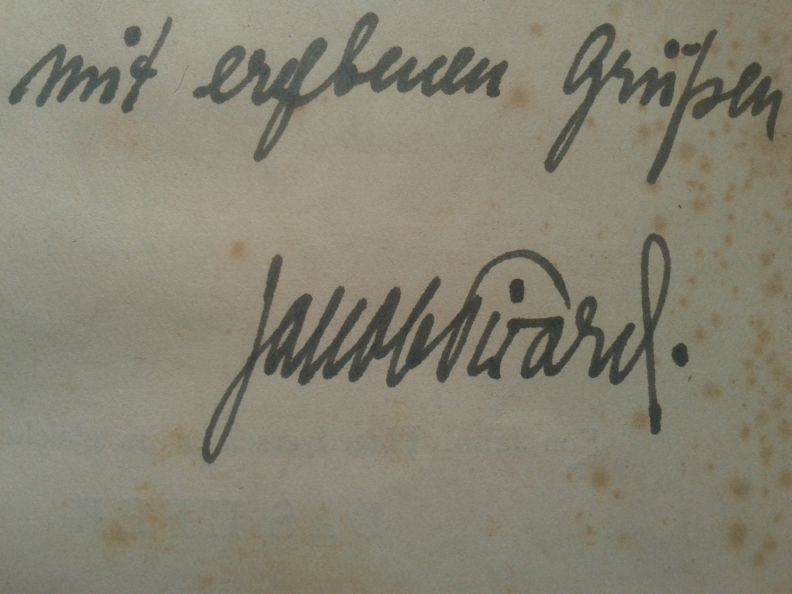 Handschriftliche Widmung und Unterschrift in: Jacob Picard: Erschütterung. Gedichte, Heidelberg 1920. Sammlung Markus Wolter